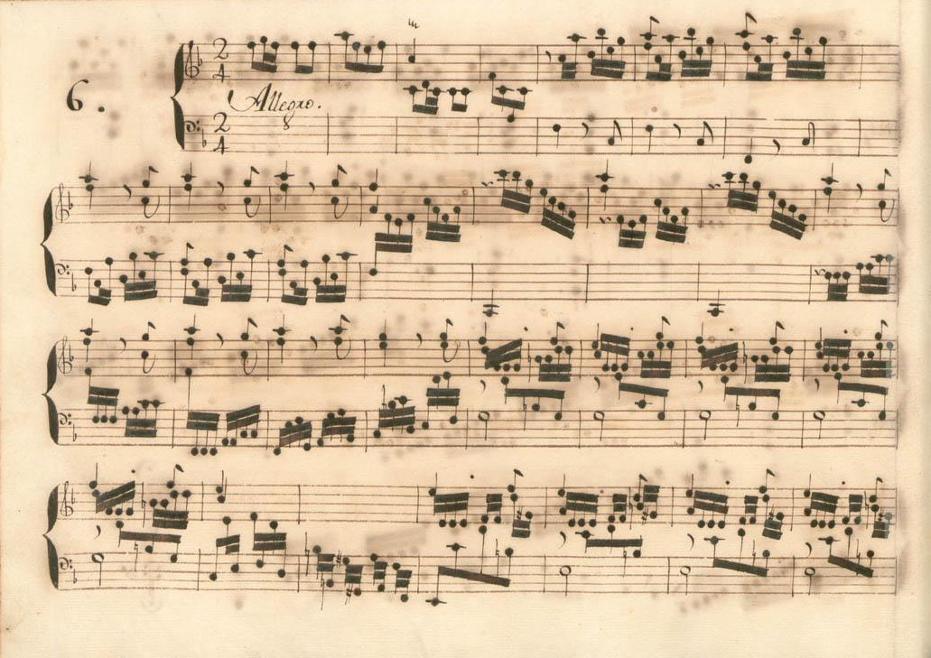 La sonate K. 366, telle qu'elle se présente dans le manuscrit de Parme, volume X no. 6.